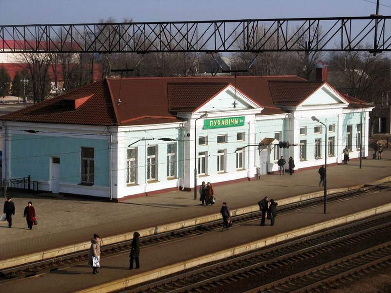 Марьина Горка. Железнодорожная станция